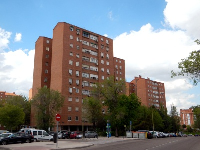 Edificios en la calle Valdebernardo, barrio de Pavones. Madrid.